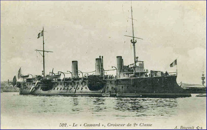 Cassard : croiseur protégé français - Classe D'Assas (1896).